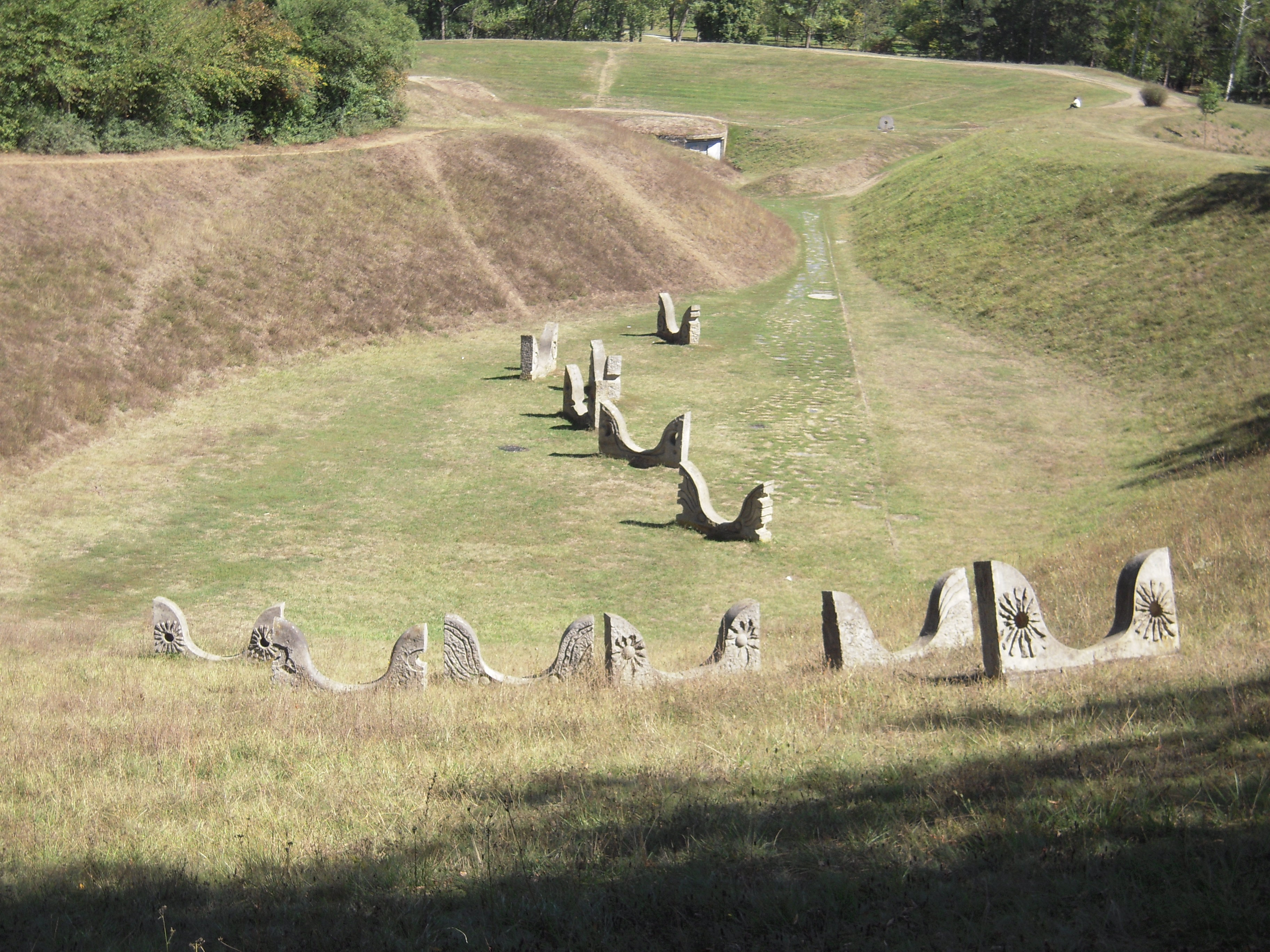 Меморијални комплекс „Слободиште“ у Крушевцу